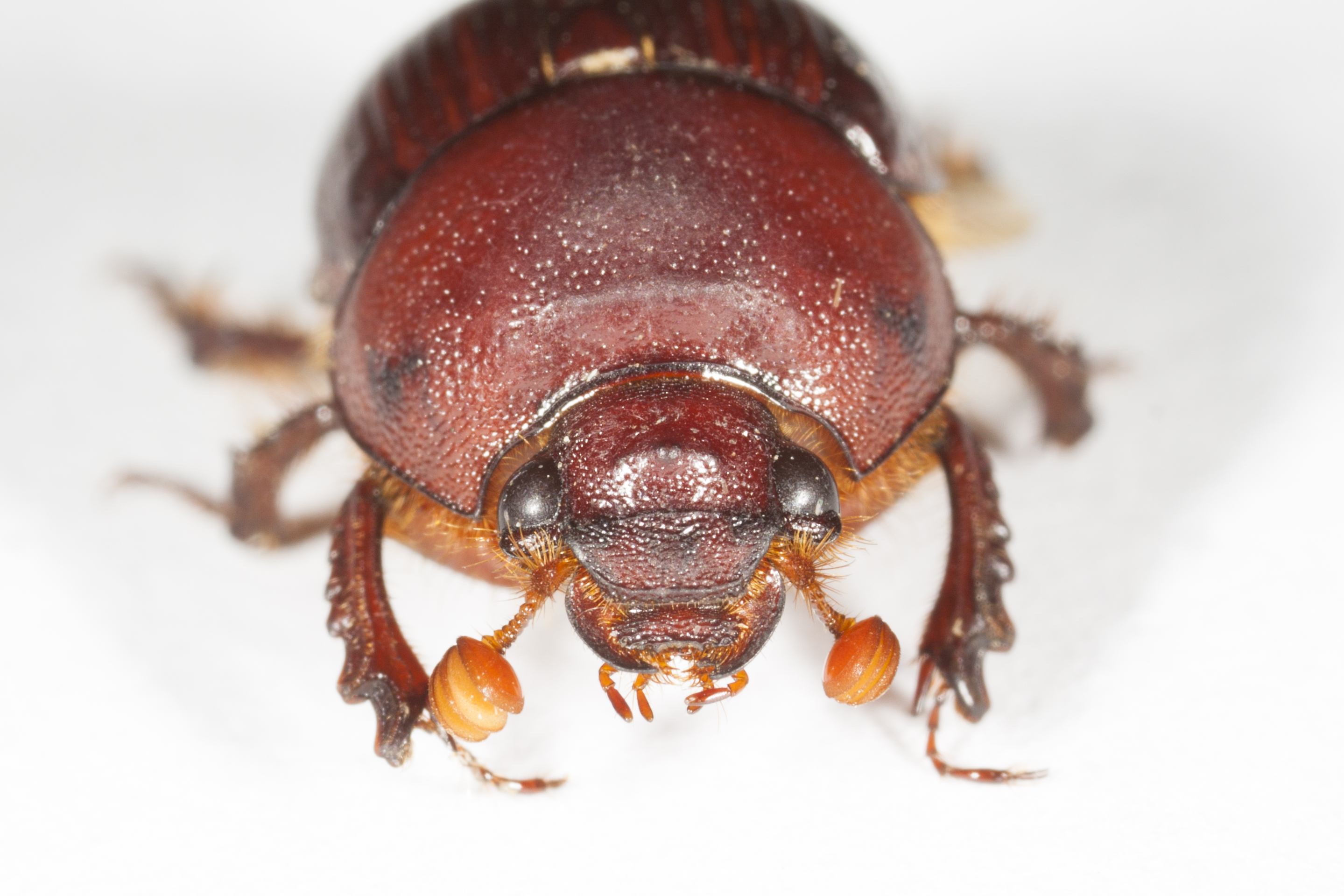 Bolbelasmus nativus Krikken, 1977 黑臀厚角金龜